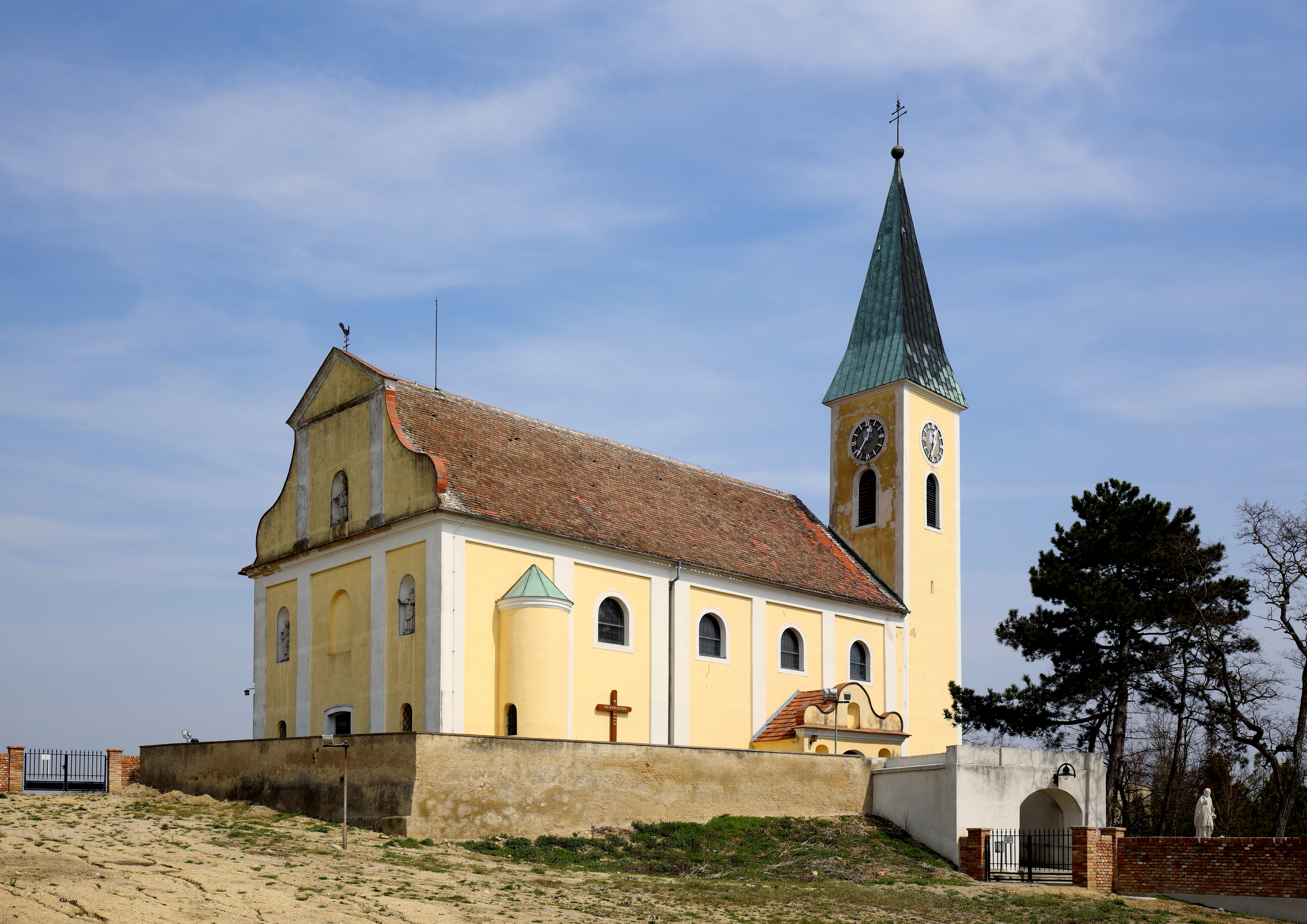 Südwestnsicht der katholischen Pfarrkirche hl. Nikolaus in der niederösterreichischen Marktgemeinde Großebersdorf. Eine barocke Kirche in erhöhter Lage mit einem gotischen Chor und einem Südturm um 1400. Im Jahr 1908 wurde das Langhaus um zwei Joche Richtung Westen erweitert.